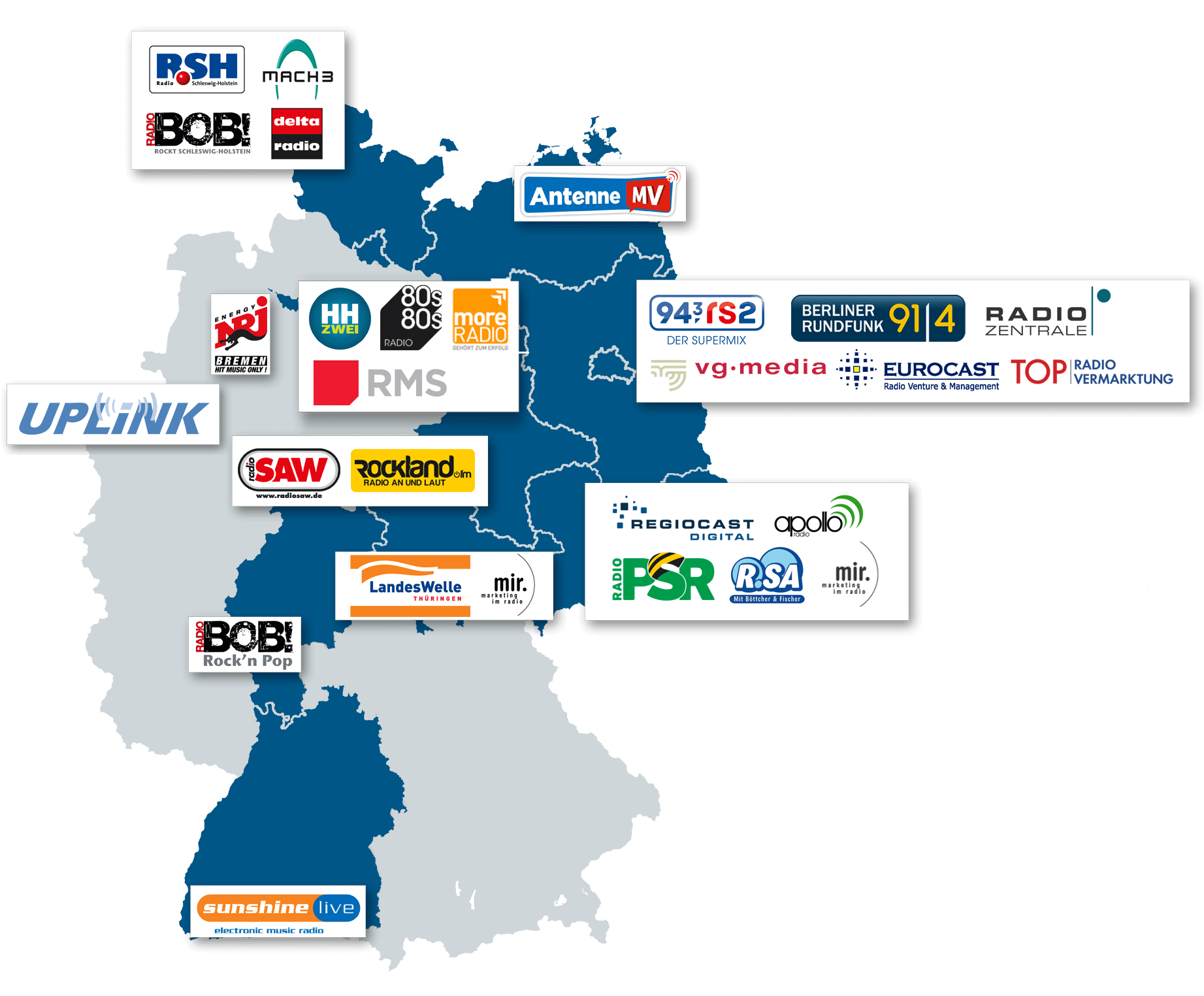 Beteiligungsgrafik REGIOCAST 09/2010